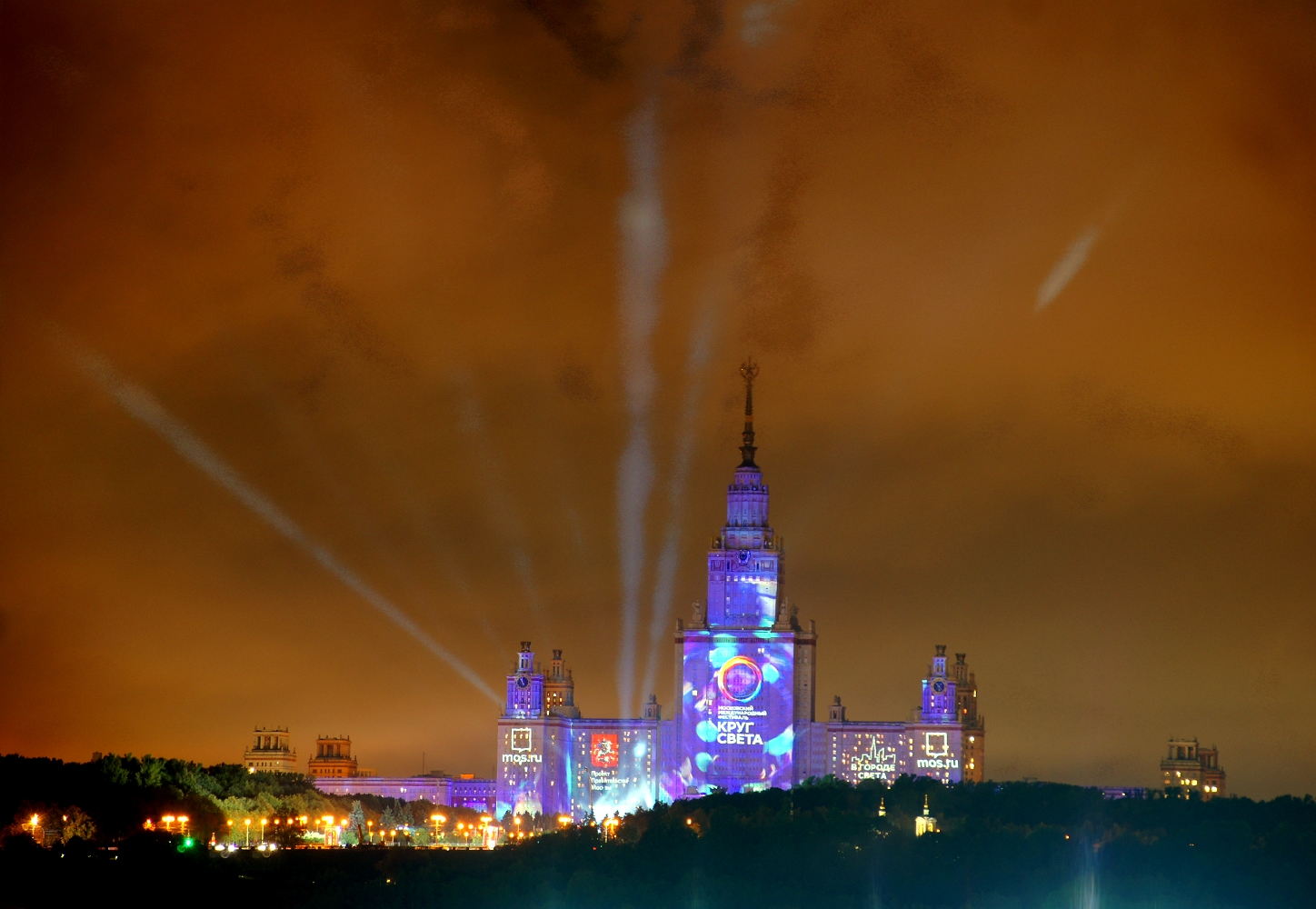 Репетиция Московского фестиваля «Круг Света». Главное здание МГУ.